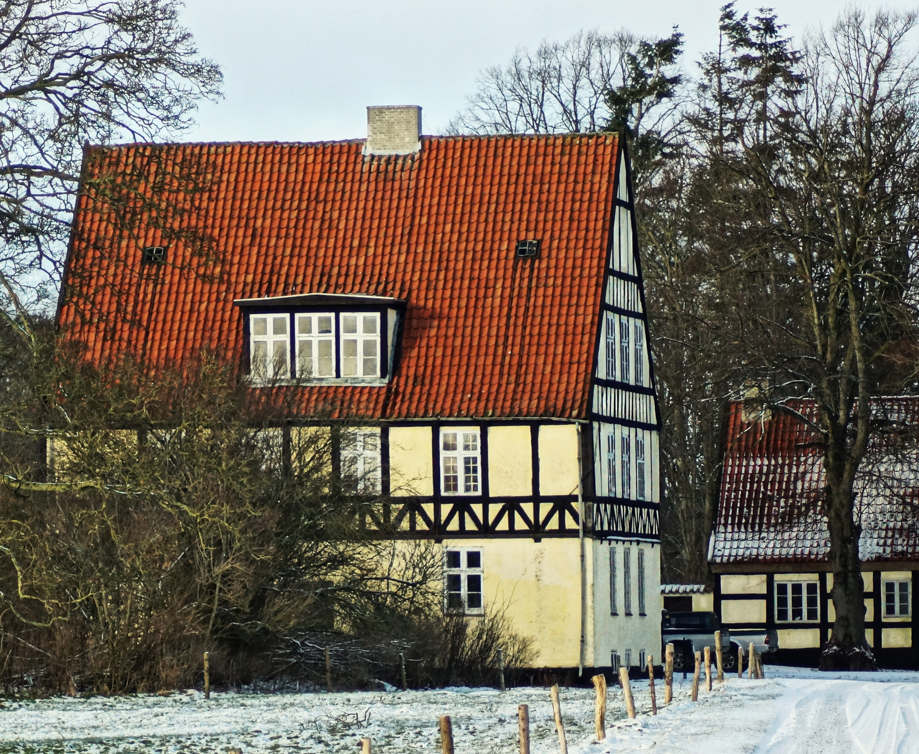 Vedø gods v. Kolindsund